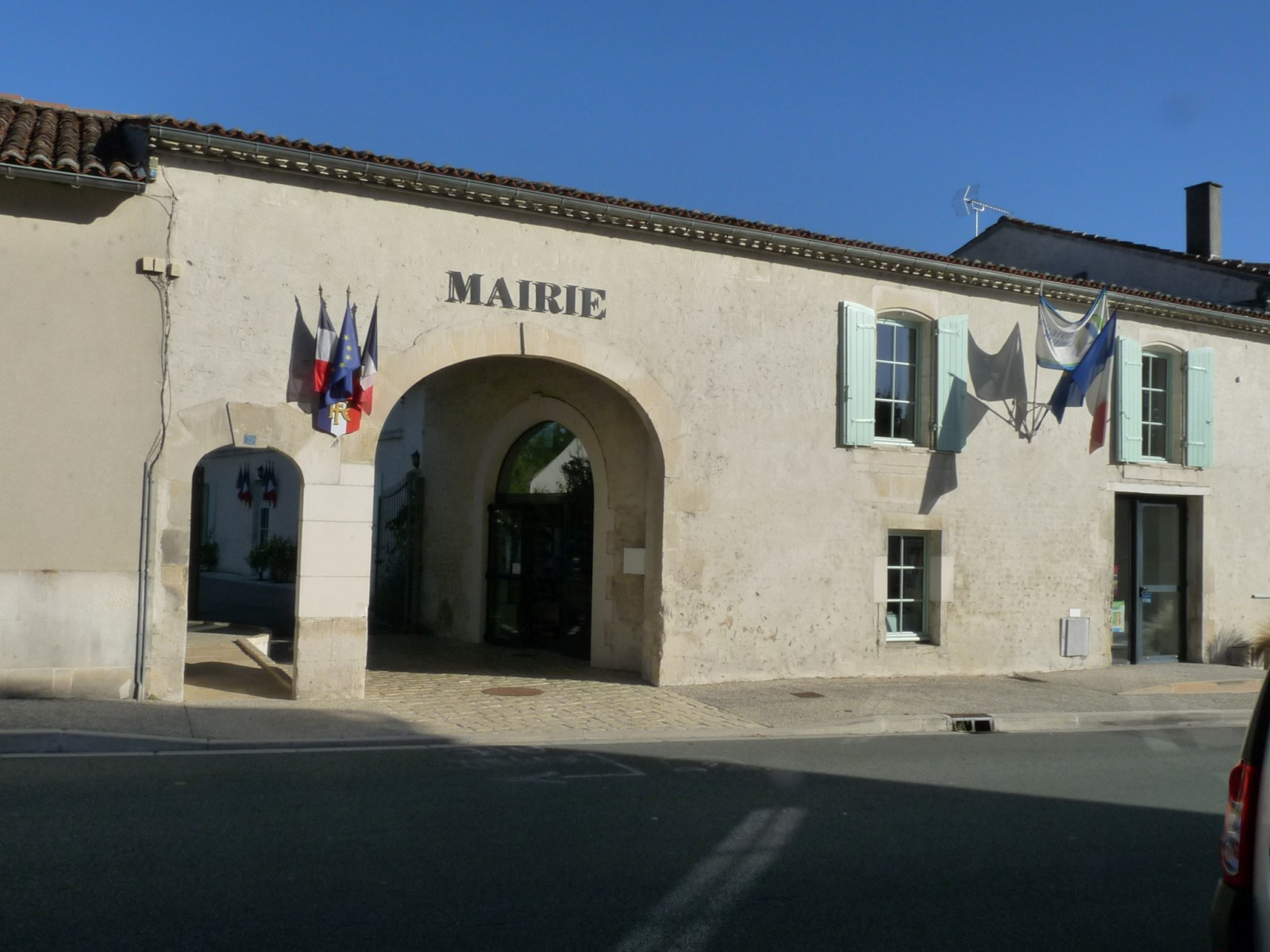 Mairie de Pérignac, Charente-Maritime, France